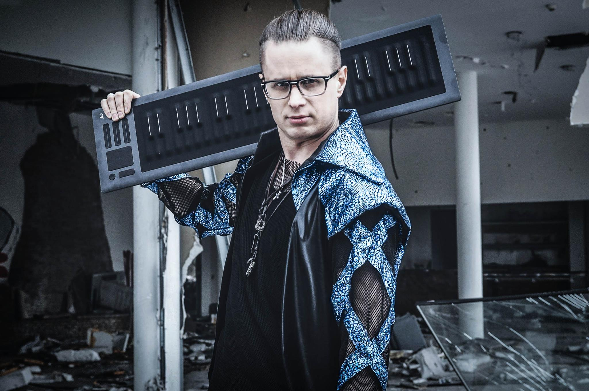 Michał Wierba w 2017 roku.